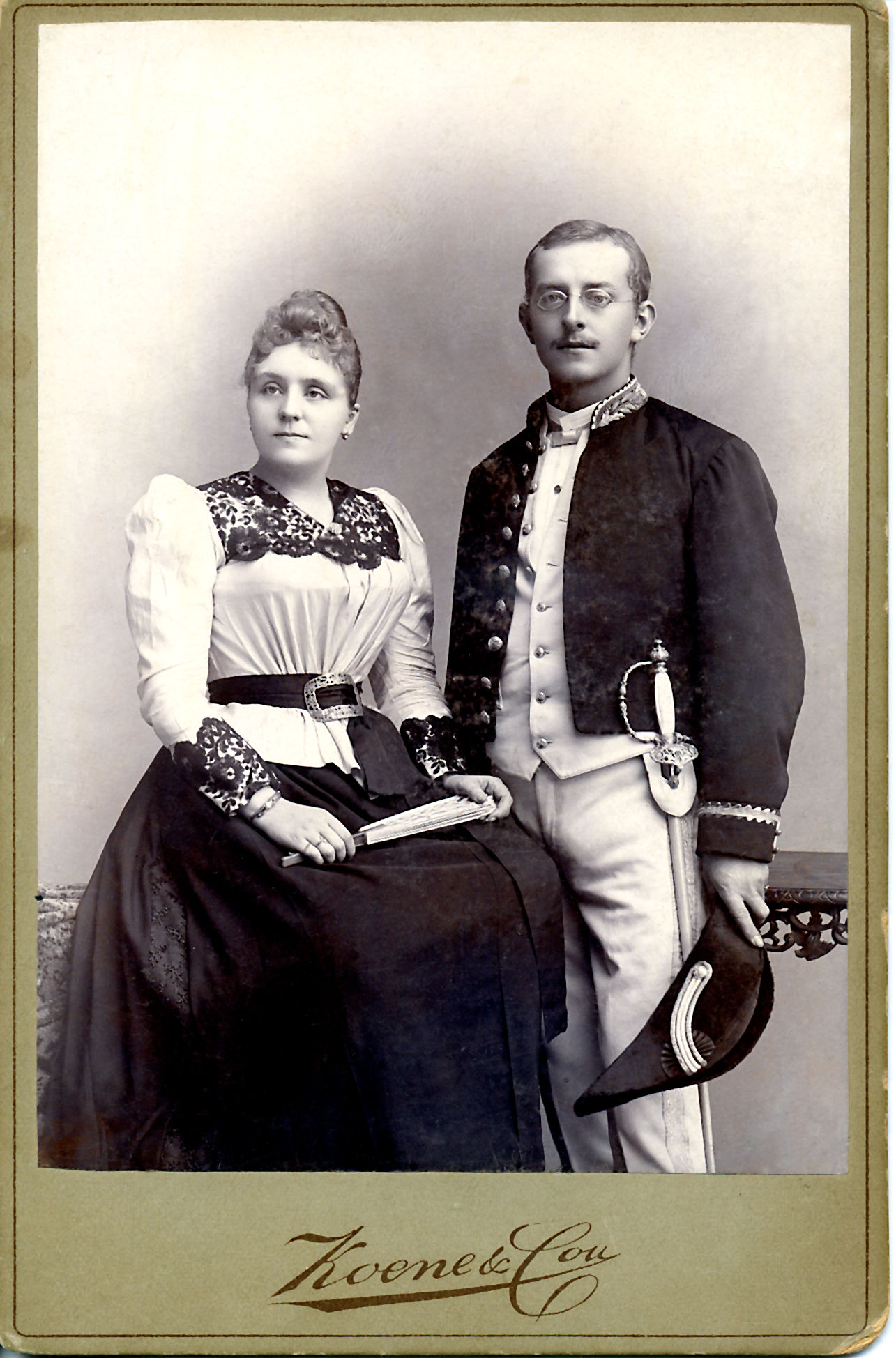 Carte de visite van W.D. van Drunen Littel en echtgenote (1890), gemaakt door fotostudio Koene & Co. Deze studio had eind 19e eeuw vestigingen in Amsterdam, Alkmaar en Batavia.